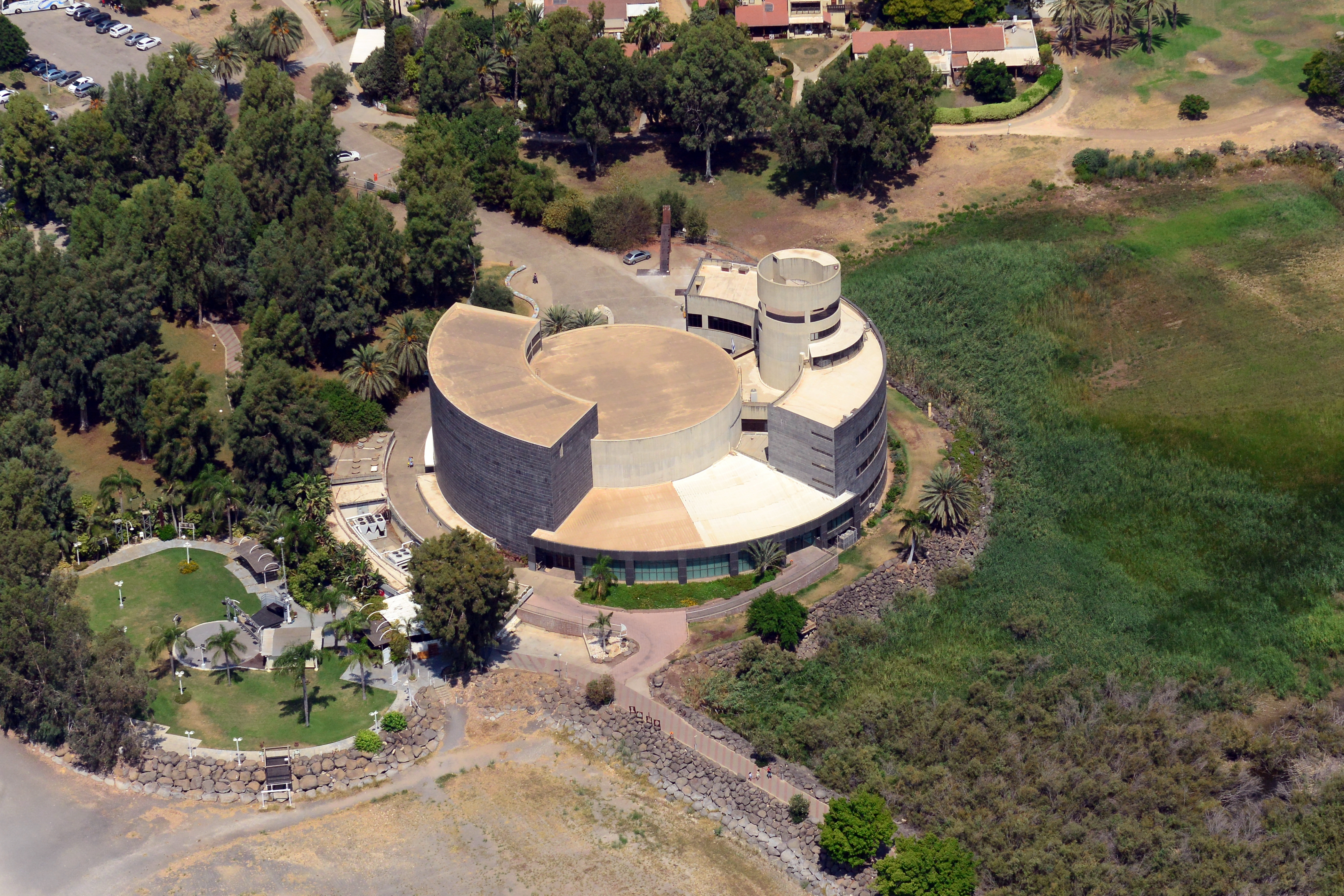 בית יגאל אלון או מוזיאון אדם בגליל הוא מוזיאון השוכן בקיבוץ גינוסר לחוף הכנרת. המוזיאון קרוי על שמו של יגאל אלון שהיה חבר הקיבוץ ונקבר בו, ומשמש מרכז חינוכי לתולדות הגליל.